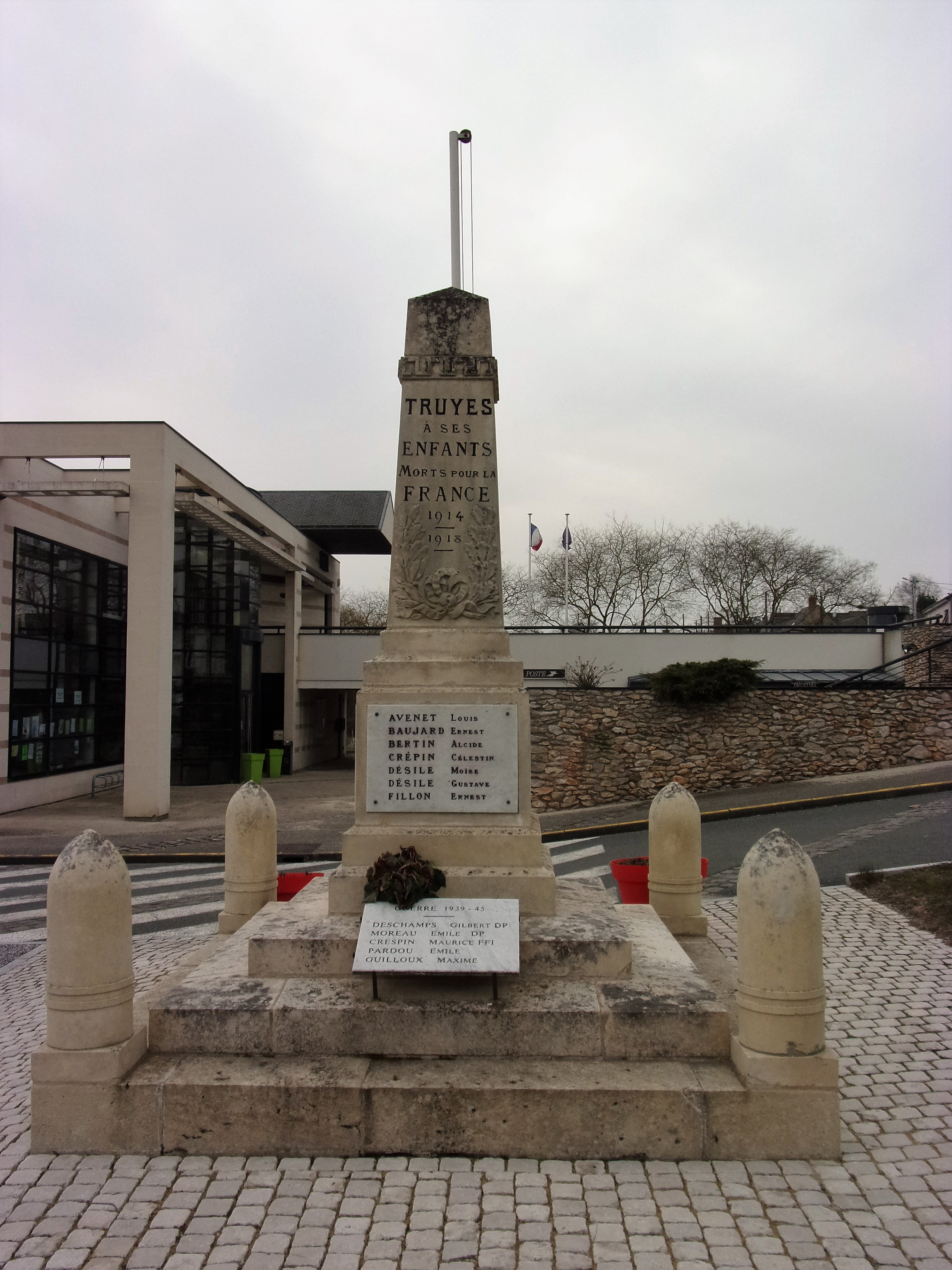 Le monument aux morts de TruyesRue du clocher. Coordonnées : 47.233125, 0.847679